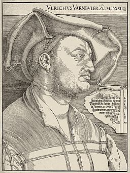 Albrecht Dürer: Portrait Ulrich Varnbüler